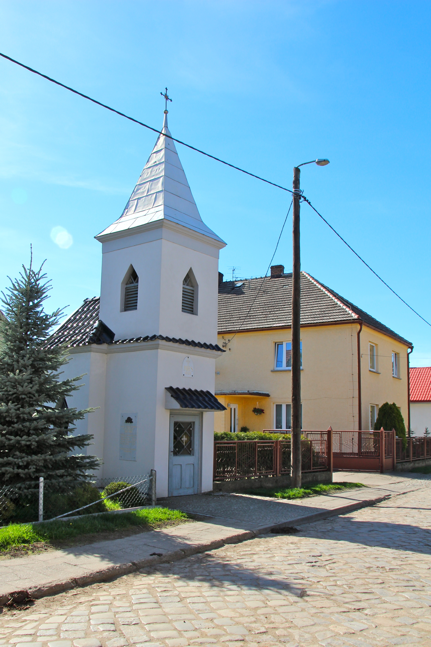 Głogowiec wieś w Polsce położona w województwie opolskim, w powiecie prudnickim, w gminie Głogówek.